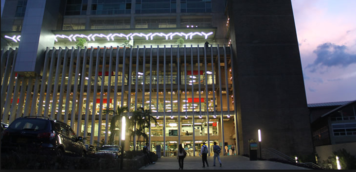 engineering building